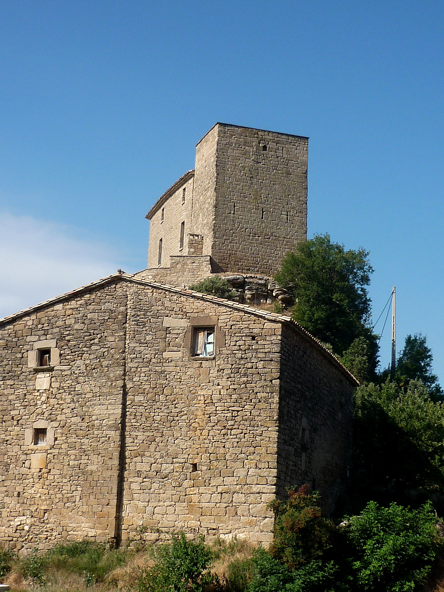 Castell de Besora, vista des del nord, amb la masia de cal Cabrit a sota, al municipi de Navès (Solsonès)